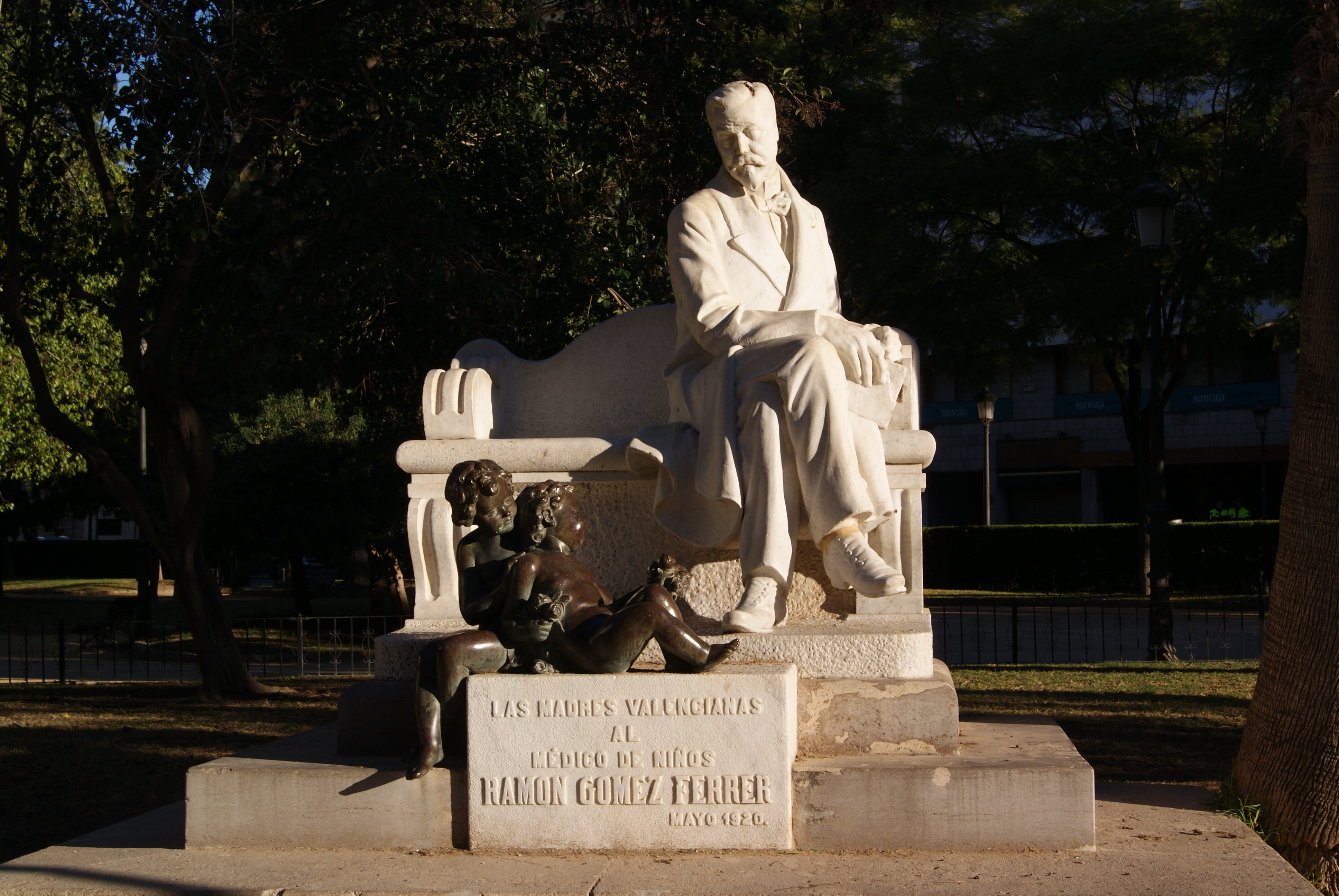 Escultura en memoria del doctor Ramón Gómez Ferrer. Costeada por las madres valencianas al doctor de los niños como agradecimiento a su dedicación en pro de la infancia.